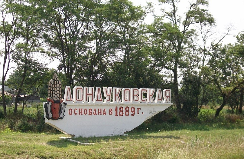 Указатель при въезде в станицу Дондуковская